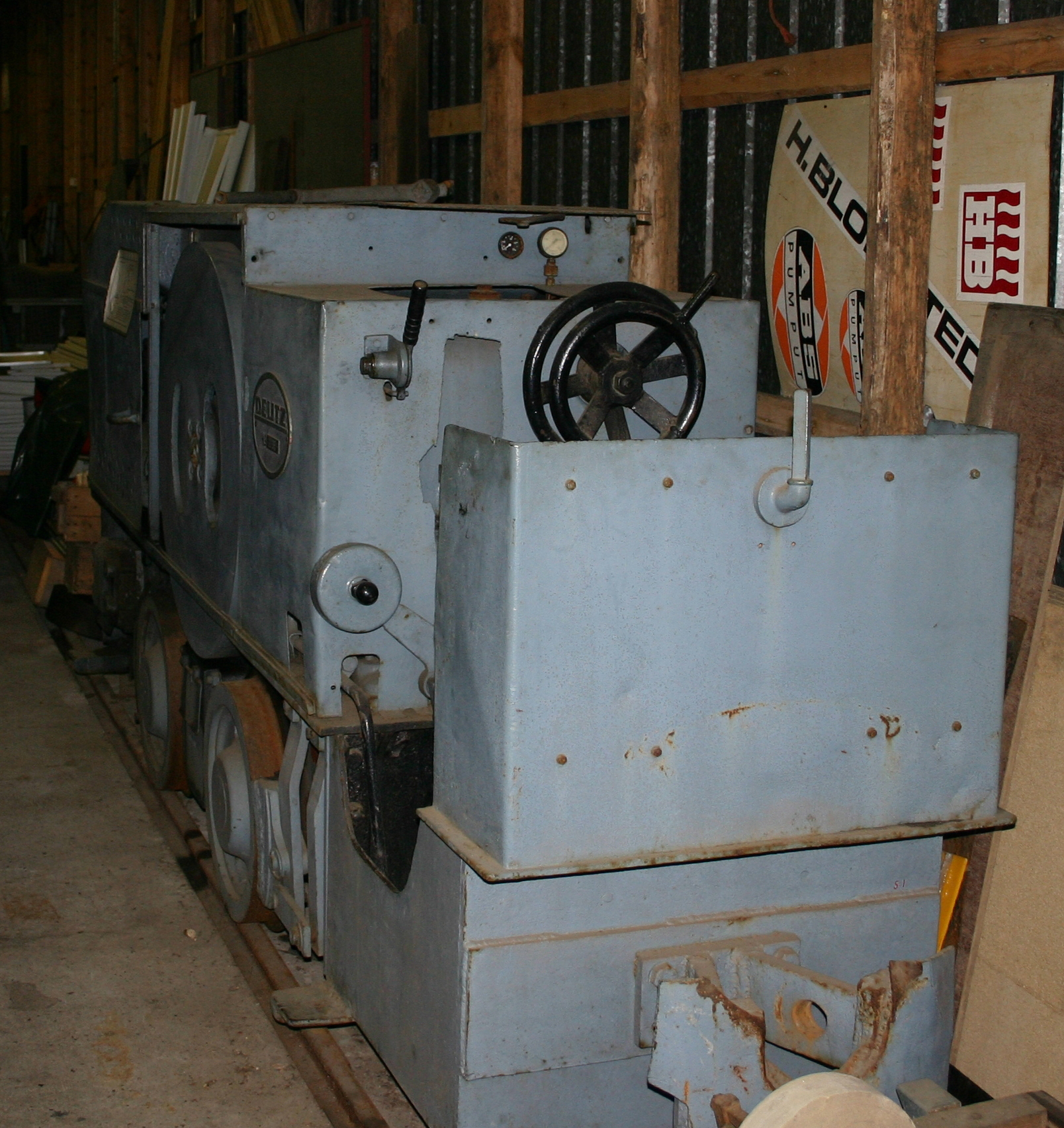 Kaivosveturi museossa